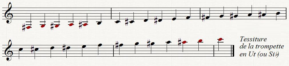 Tessiture de la trompette commune (écrite dans la tonalité de l'instrument). Copie d'écran Sibelius.